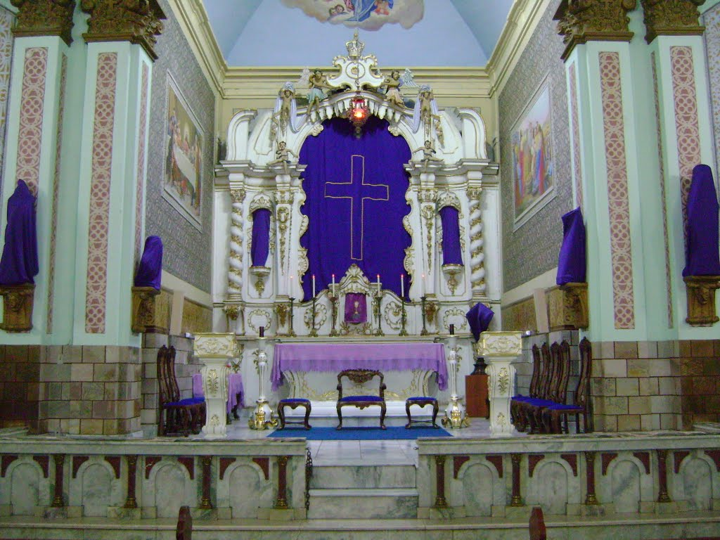 Matriz antiga de Resende Costa